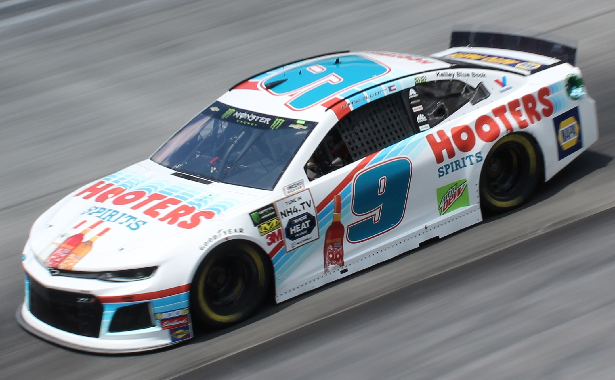 chase elliott